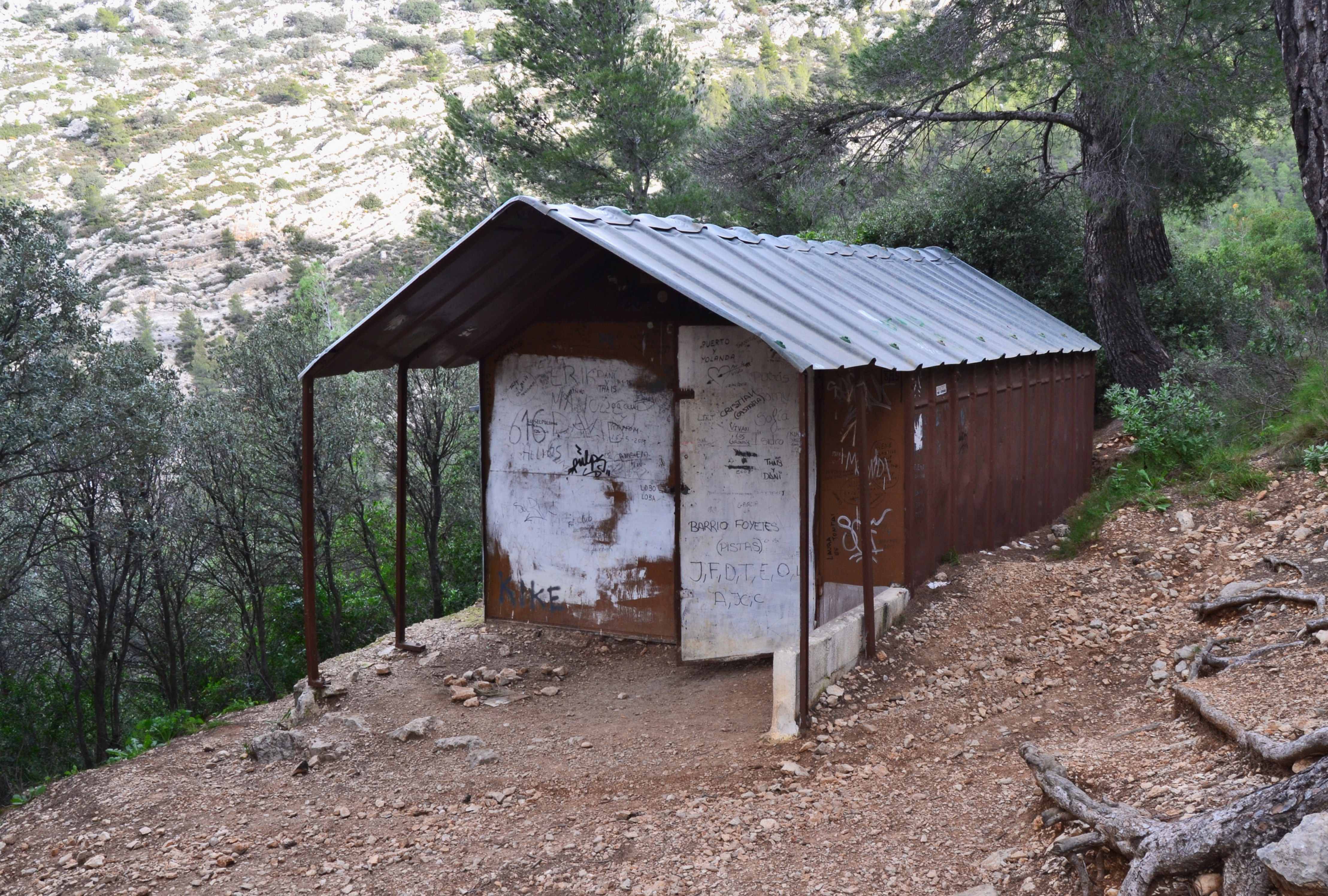 Refugi J. M. Vera, Puig Campana.